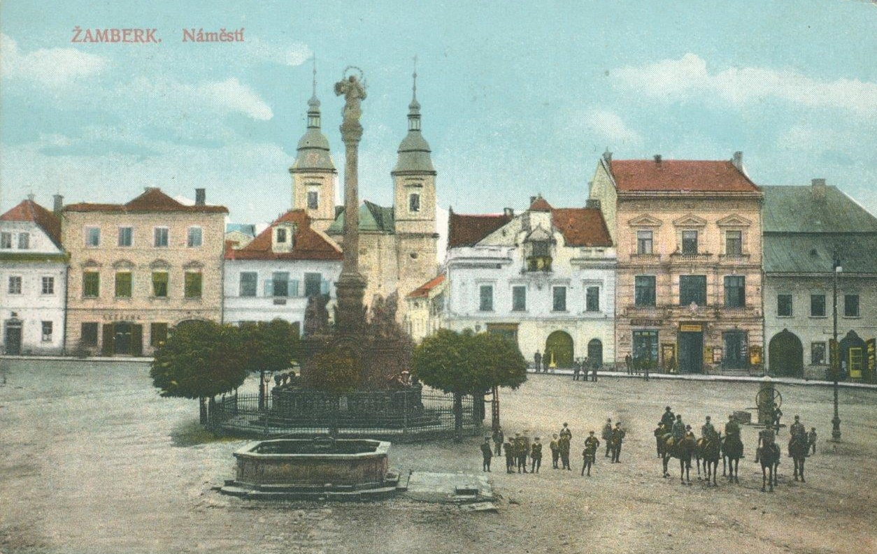 Mariánský sloup na náměstí T.G. Masaaryka s radnicí v pozadí